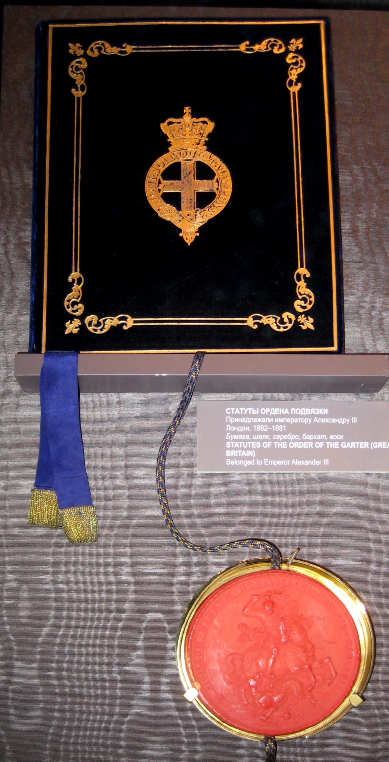 Статуты ордена подвязки. Принадлежали Александру III.